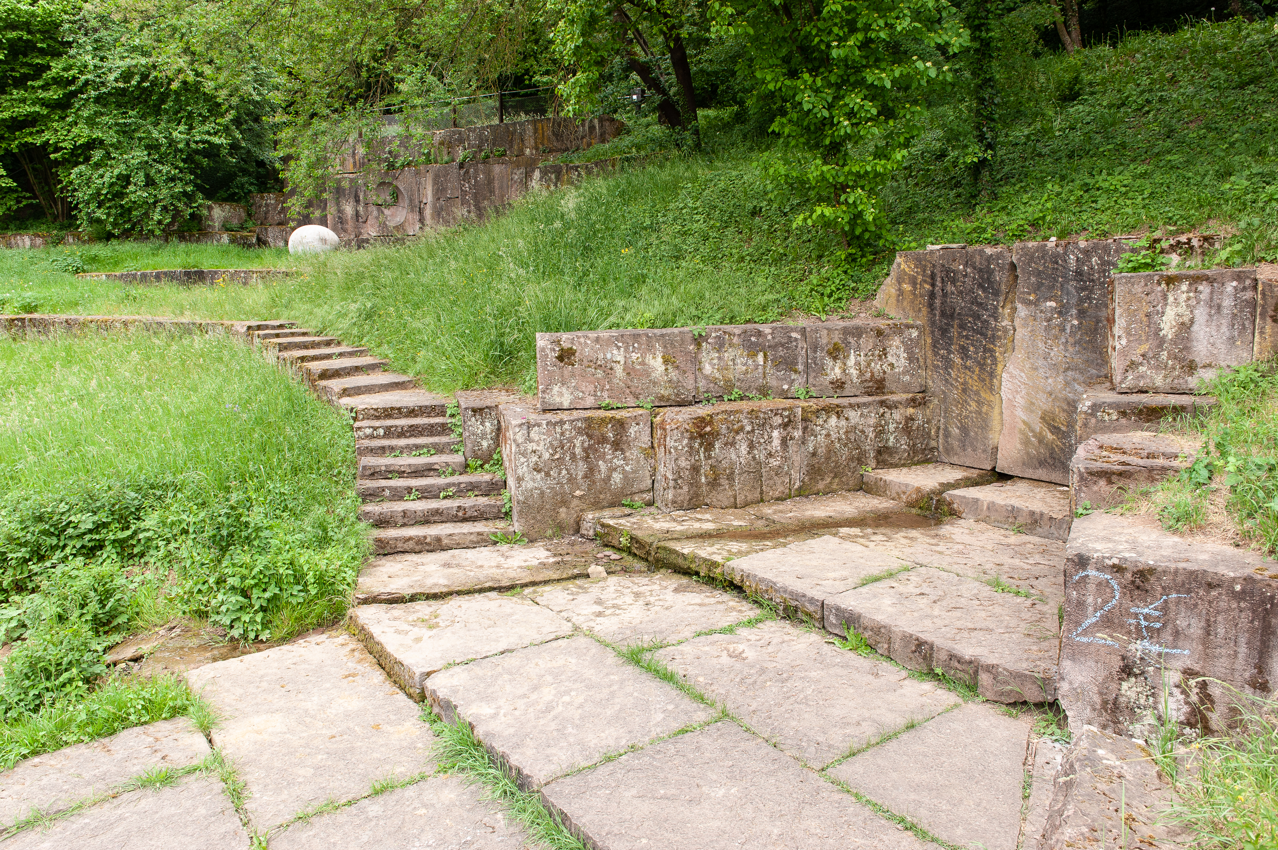 Kunststation "Im Keuper" von Hans Dieter Bohnet, Gelände der Internationalen Gartenbauausstellung 1993, Stuttgart